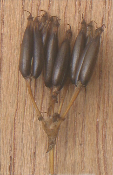 (nl: Fluitenkruid vruchten) Anthriscus sylvestris fruits